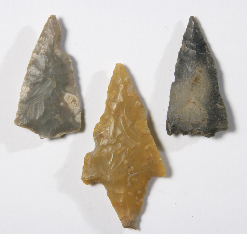 Punte di freccia in selce dal territorio di Castelleone con spalla e peduncolo, per cacciare, ma anche per uso bellico. Prodotto della scheggiatura della pietra.